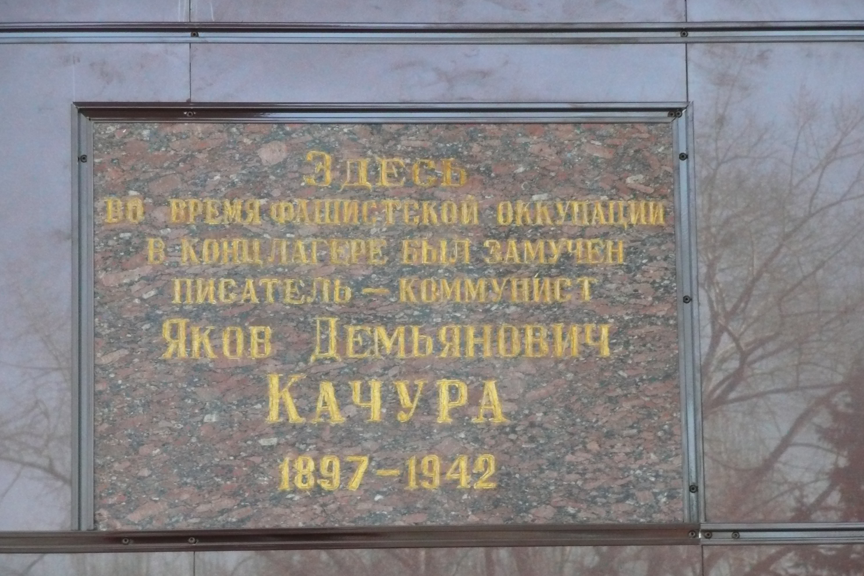 Донецк. ДК металлургов.